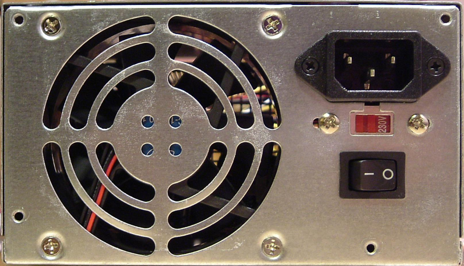 Figura 9.1. Pannello posteriore di un alimentatore tipico. Alla destra della grata della ventola, si vede: la spina tripolare da pannello; il cambio tensione; l'interruttore.